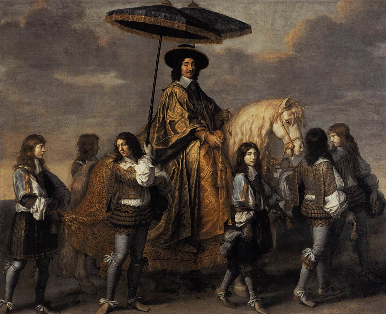 Pierre Séguier, premier magistrat du royaume, fut le principal protecteur de Le Brun pendant sa jeunesse. Ce portrait fut sans doute peint dans le contexte de l’Entrée royale de Louis XIV et de Marie-Thérèse à Paris, le 26 août 1660, après leur mariage à Saint-Jean-de-Luz le 9 juin de la même année.